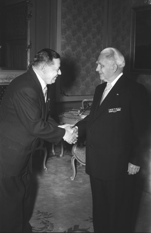 Zenralbild/Sturm 22.12.1958 Vereidigung von Karl Maron. - Am 22.12.1958 nahm der Präsident der Deutschen Demokratischen Republik, Wilhelm Pieck, gemäß Artikel 95 und 104 der Verfassung der DDR die Vereidigung von Karl Maron, Mitglied des Ministerrates und Minister des Innern der DDR, vor. UBz: Während der Verpflichtung.